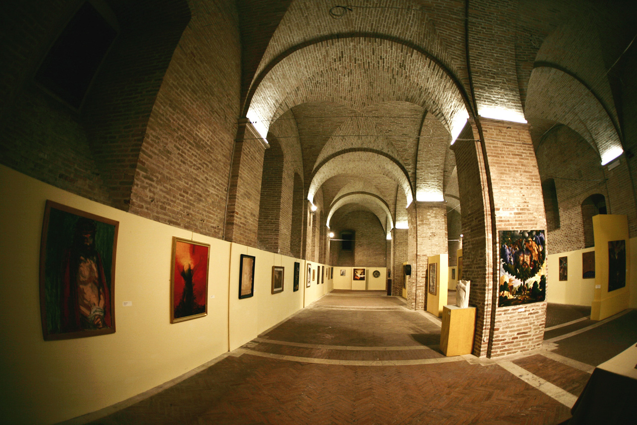 Salara dentro il Palazzo della Signoria